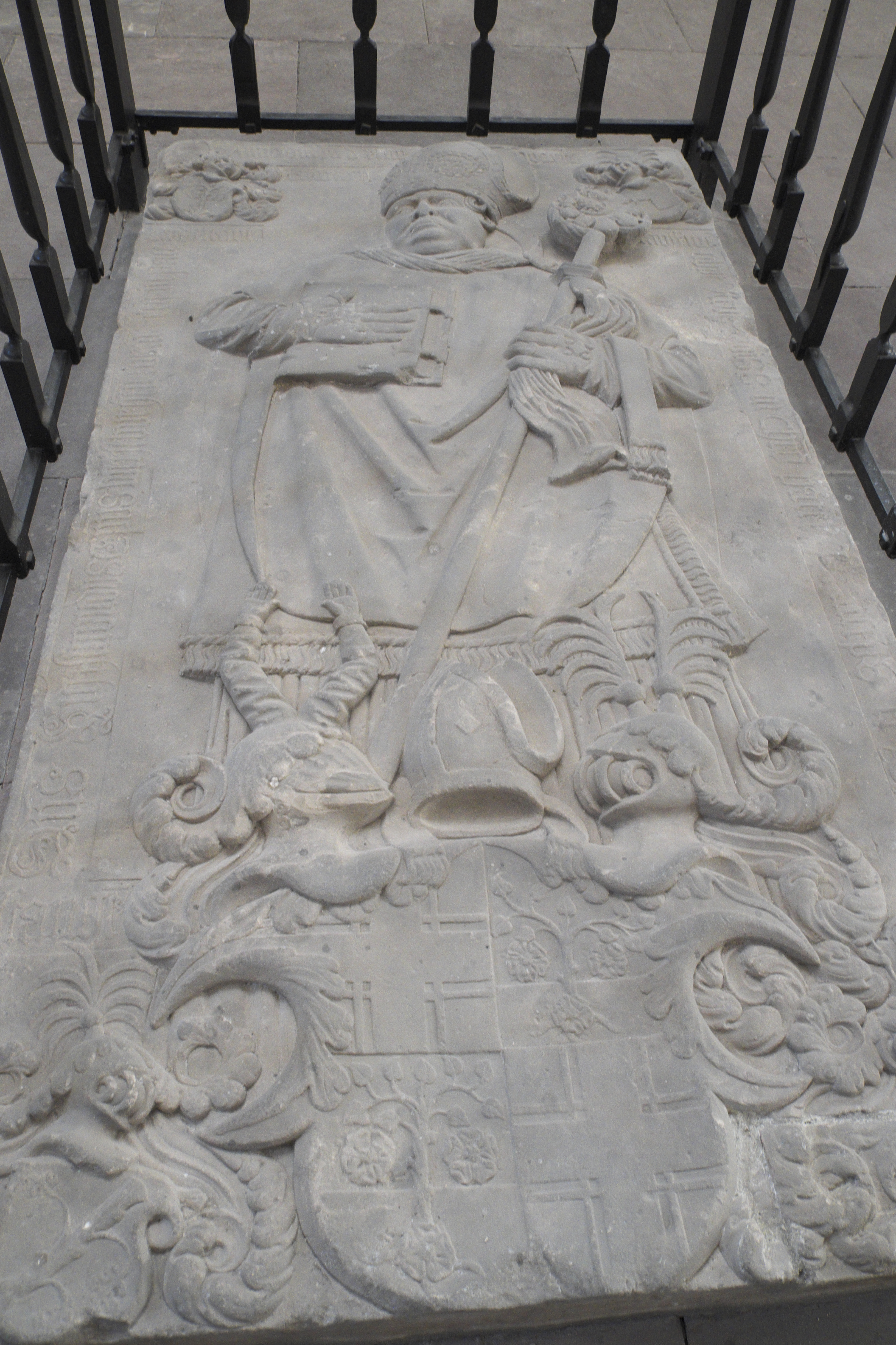 Dom St. Johannes und St. Laurentius in Merseburg im Saalekreis in Sachsen-Anhalt/Deutschland, Grabmal des Bischofs Sigismund von Lindenau († 1544)